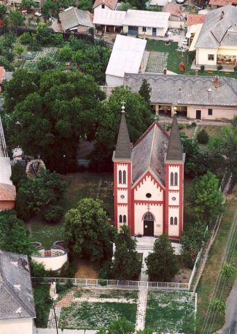 Tiszaföldvár, Hungary, aerialphotography